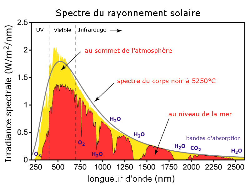 Les spectres du Soleil, théorique, sur, et sous l'atmosphère. Traduction personnelle de l'image originale de Global Warming Art